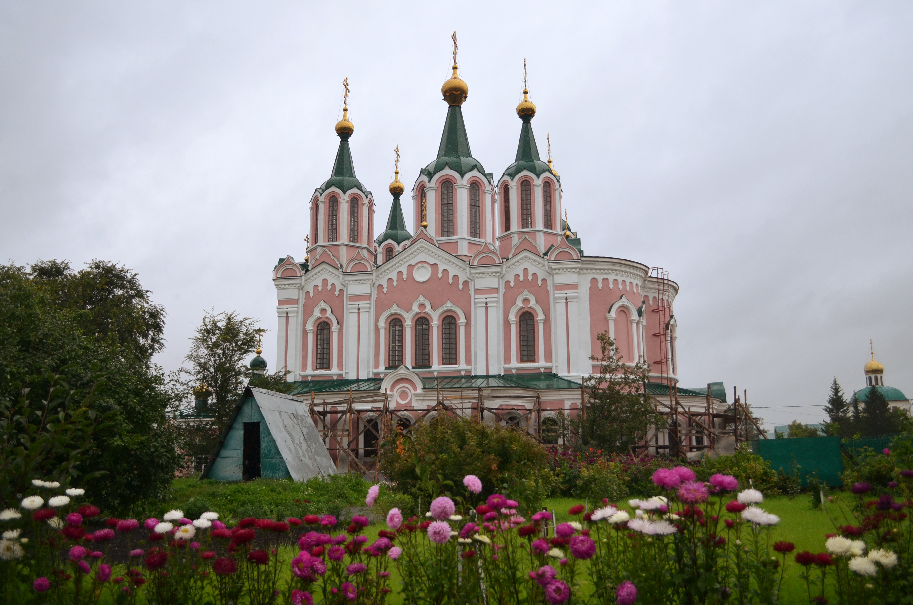 Церковь Всех Скорбящих Радости (Курганская область, Далматово, улица Советская, 63)